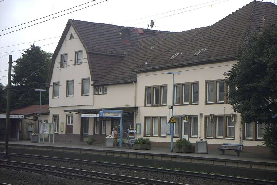 Das alte Bahnhofsgebäude in Rotenburg (Wümme), das beim Neubau des Bahnhofs abgerissen wurde